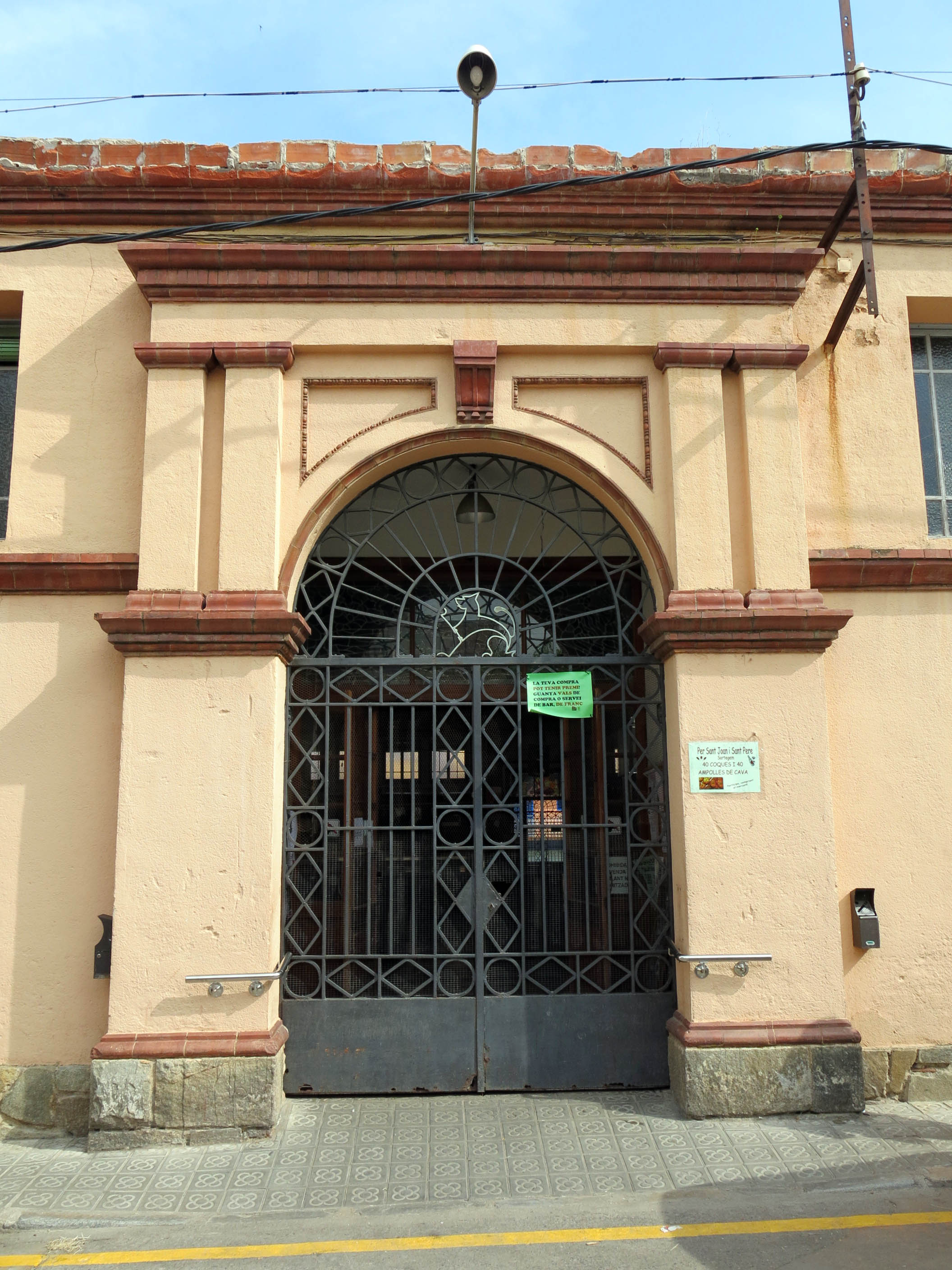 Mercat (Canet de Mar)